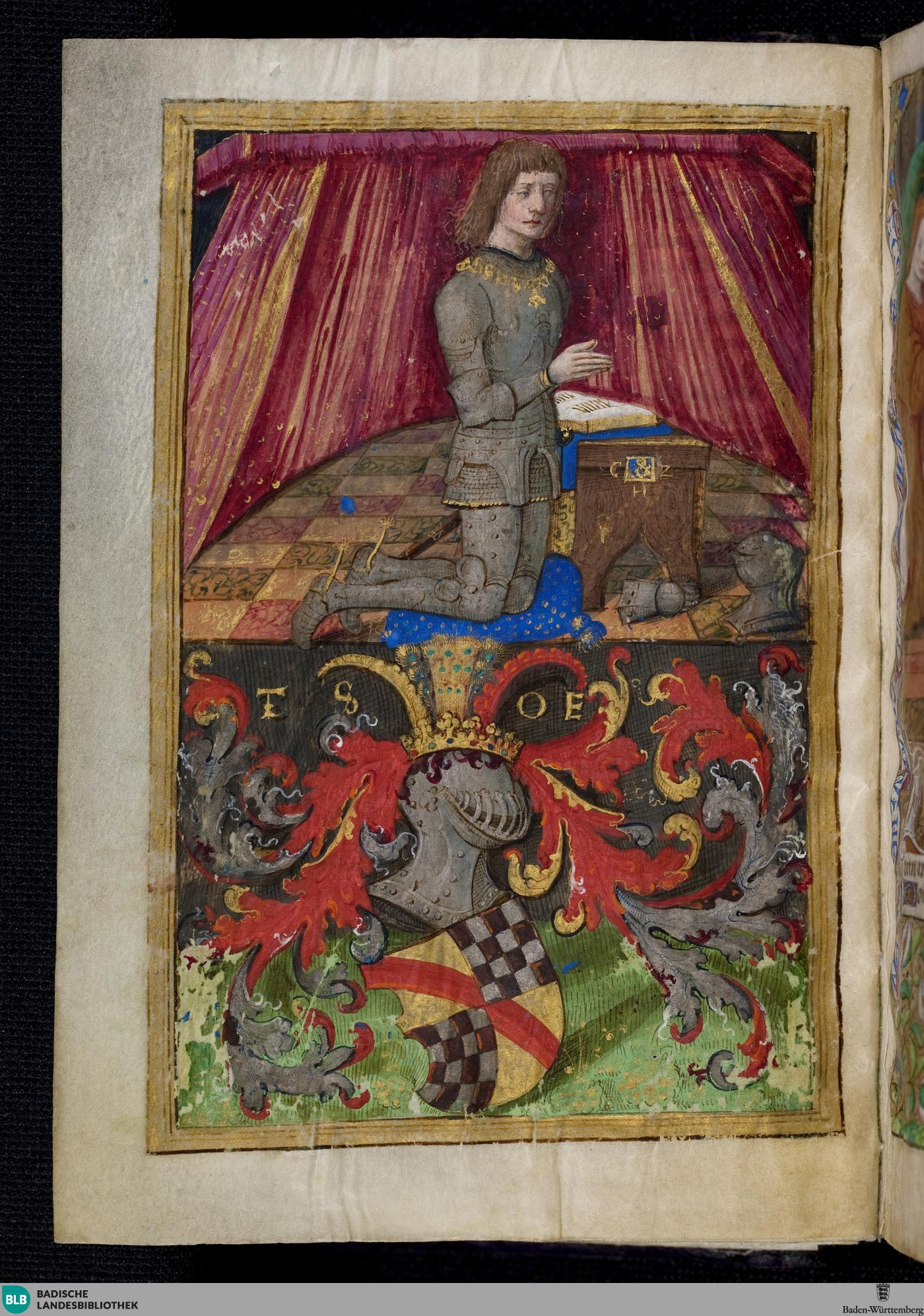 Stundenbuch des Markgrafen Christoph I. von Baden - Durlach 1 - Bl. 18v